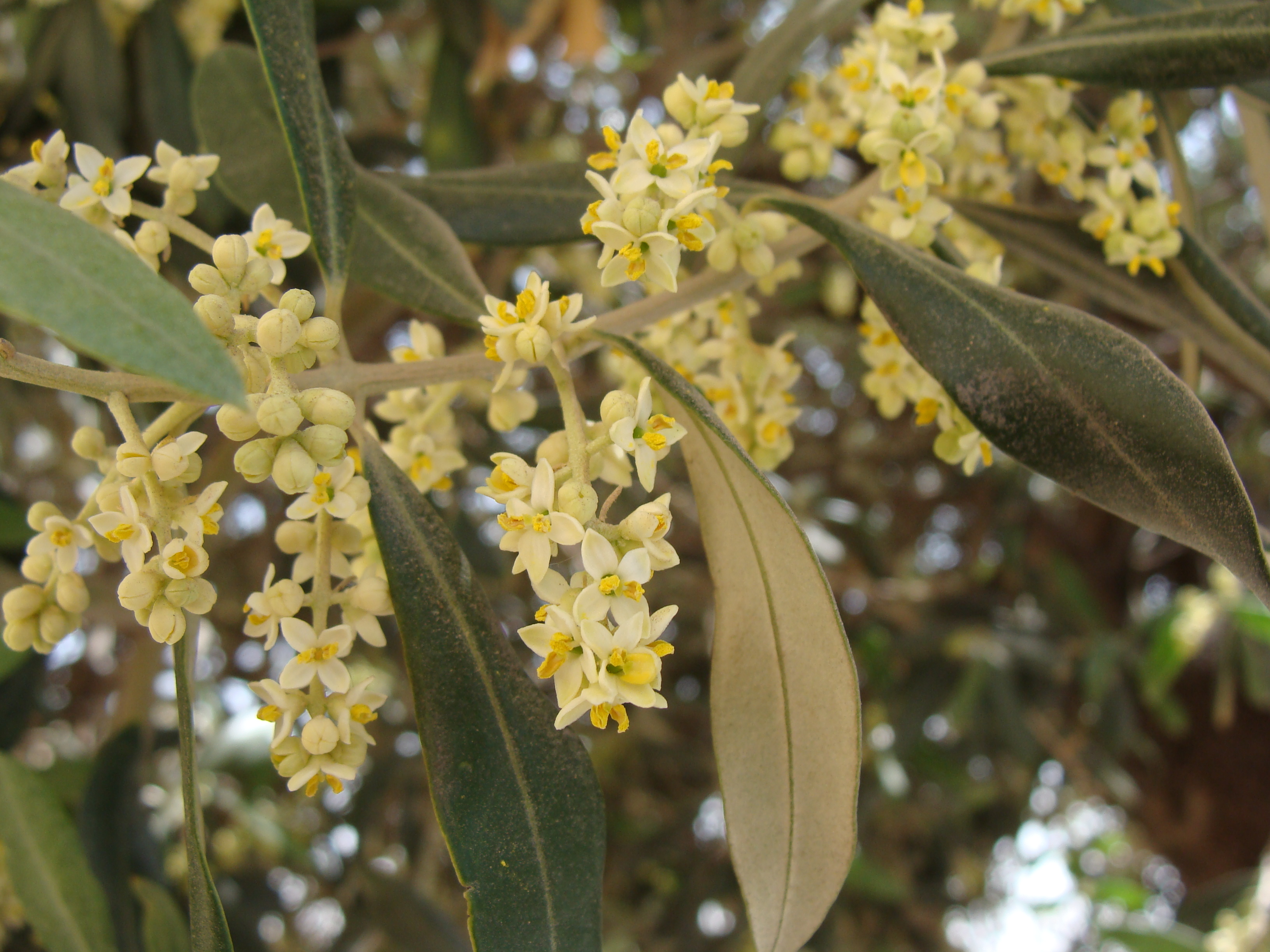 Blühender Olivenbaum